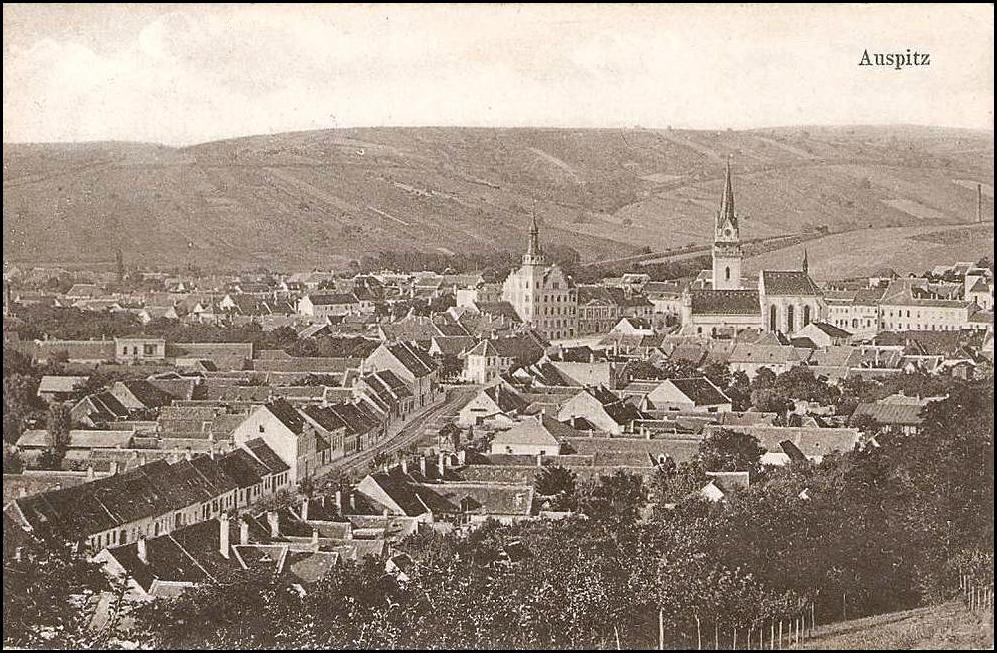 Hustopeče - pohled na město